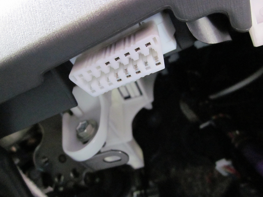 運転席のステアリングコラム横にあるOBD2のDTC（データリンクコネクター）